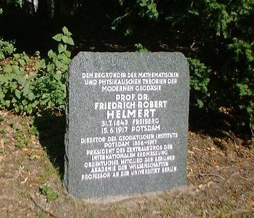 Gedenkstein für Helmert, Potsdam, Telegraphenberg